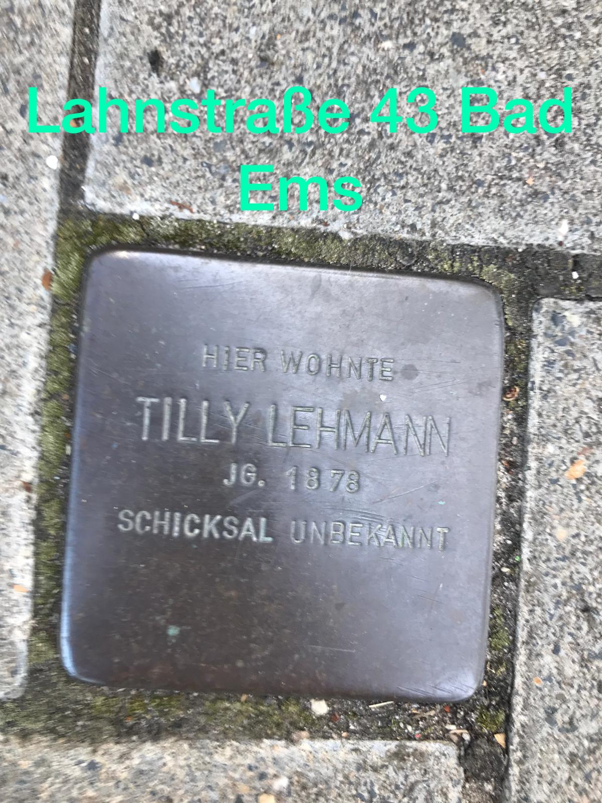 StolpersteinLahnstraße43